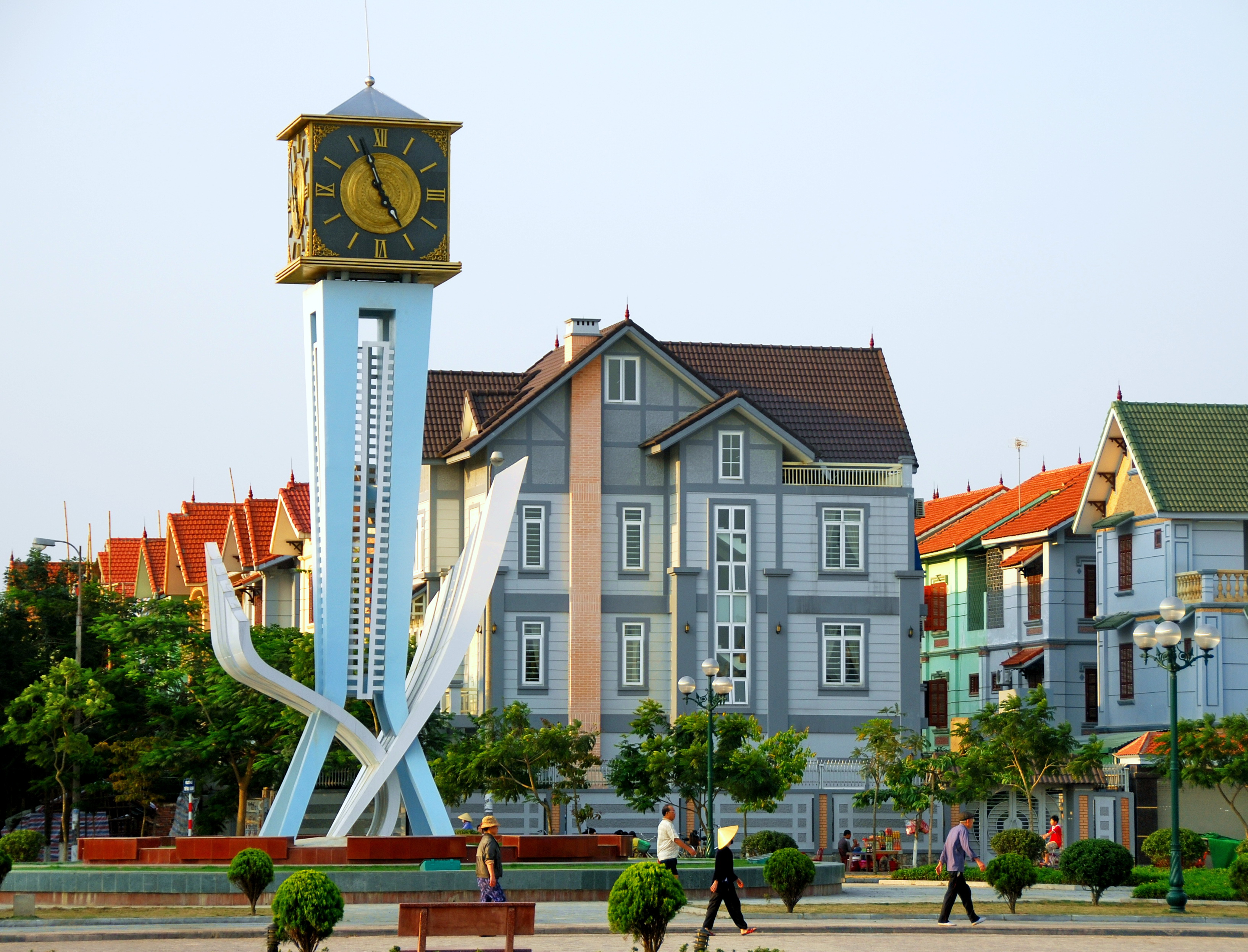 Часы на центральной площади города Тханьхоа